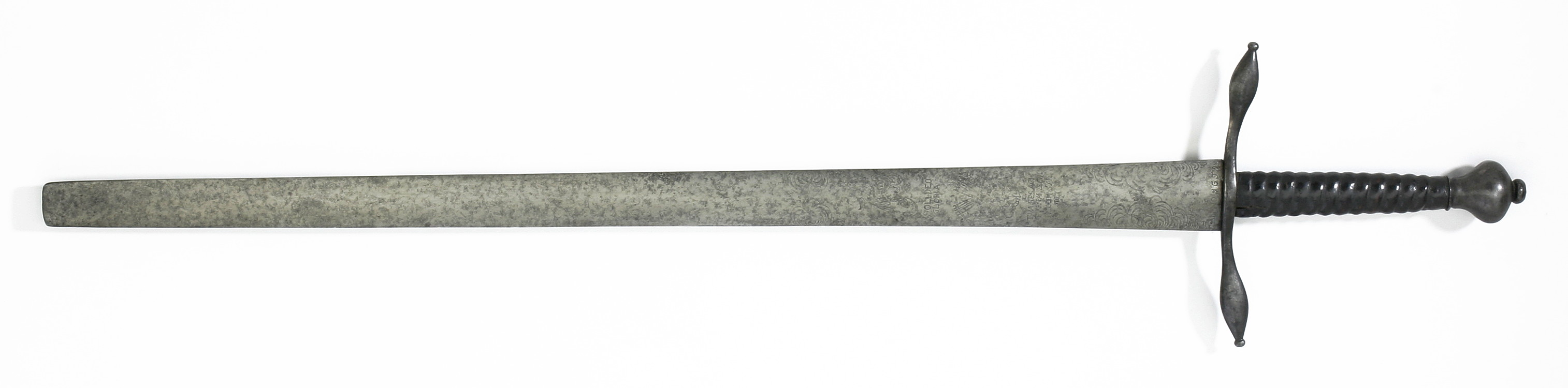 {LSH artwork |artist= |manufacturer= Jürgen Ollich (klingsmed) |title= Svärd, Vira bruk 1659. |description=